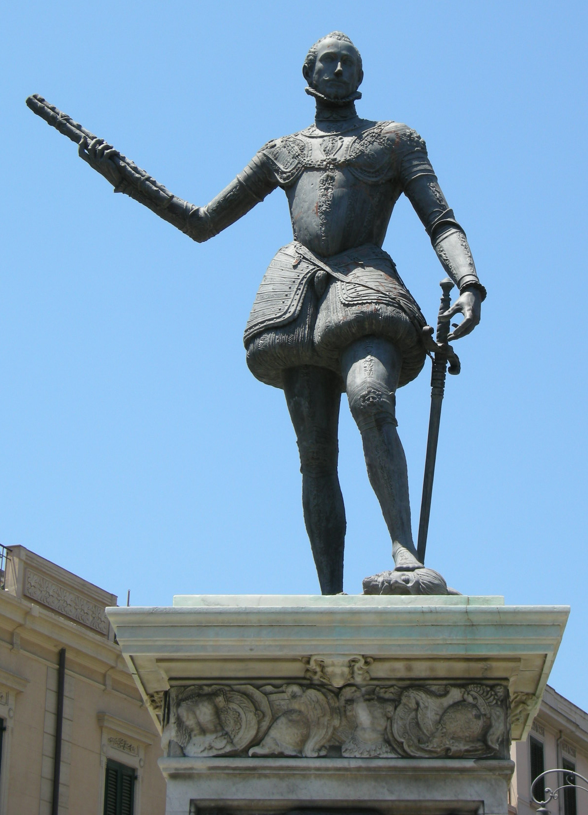 Messina, monumento a giovanni d'austria (1572) vincitore di lepanto